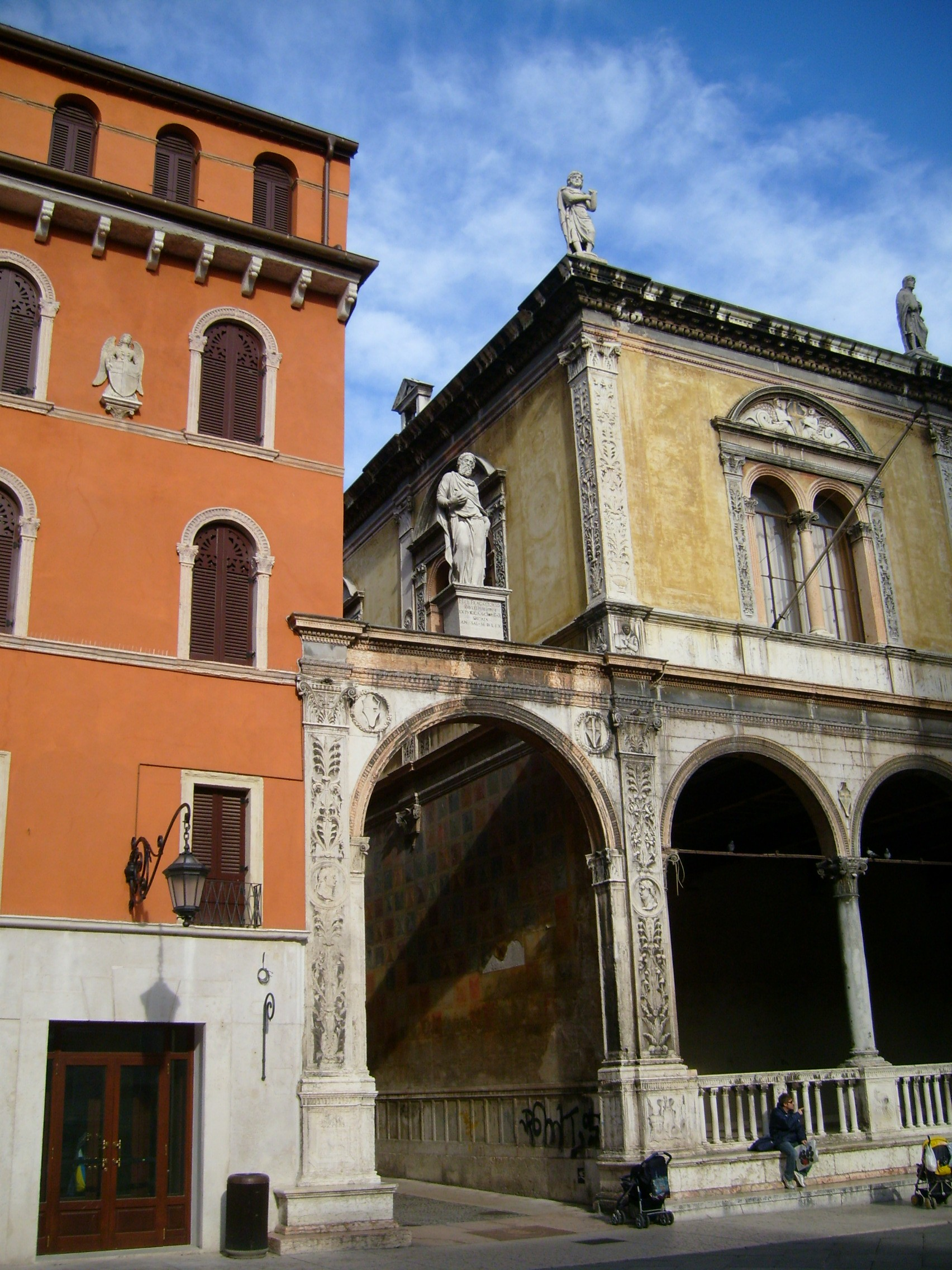 Girolamo Fracastoro's statue, Piazza dei Signori, Verona, Italy